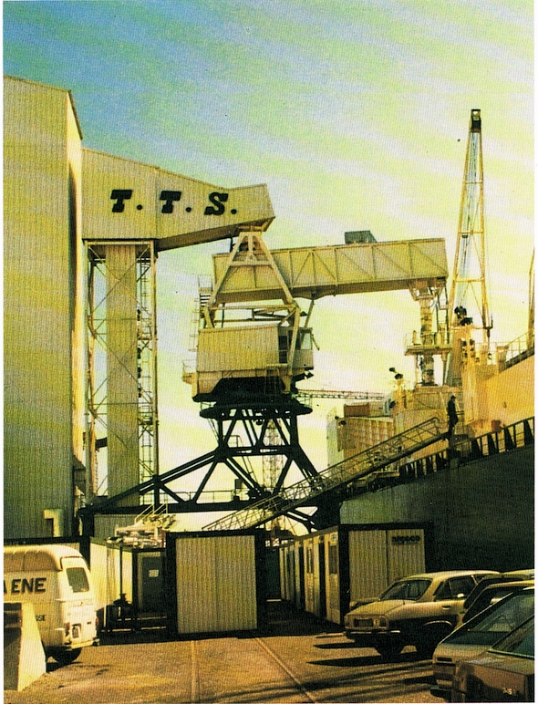 מערכת אונית צובר מתמחה ביבו